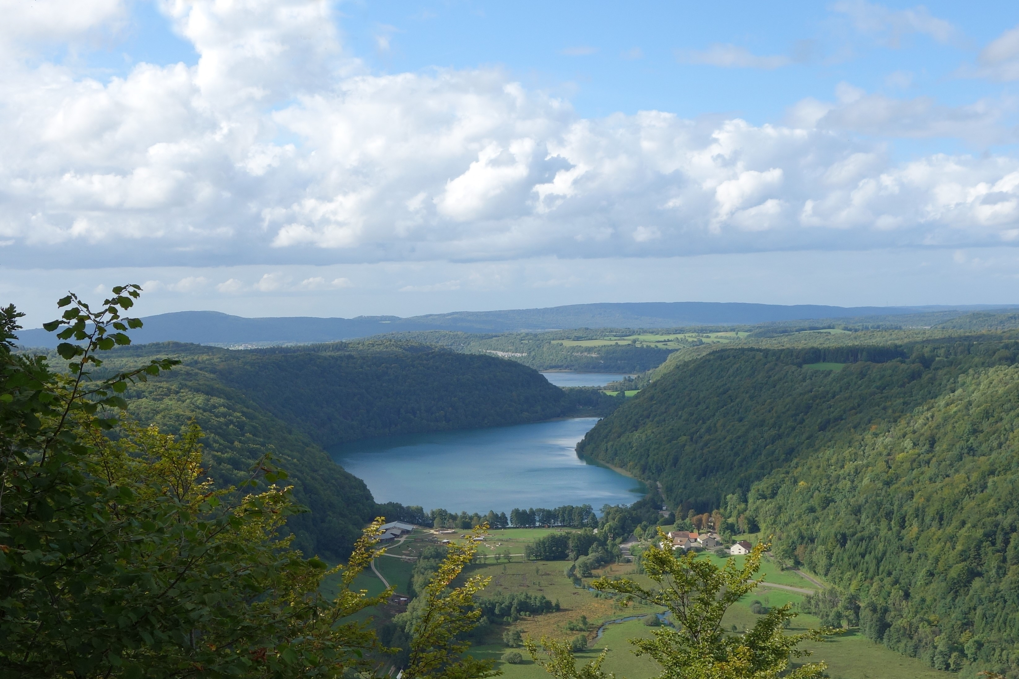 Lac du Val depuis le Belvédère de la dame blanche - Saugeot - Jura A l'arrière-plan le lac de Chambly